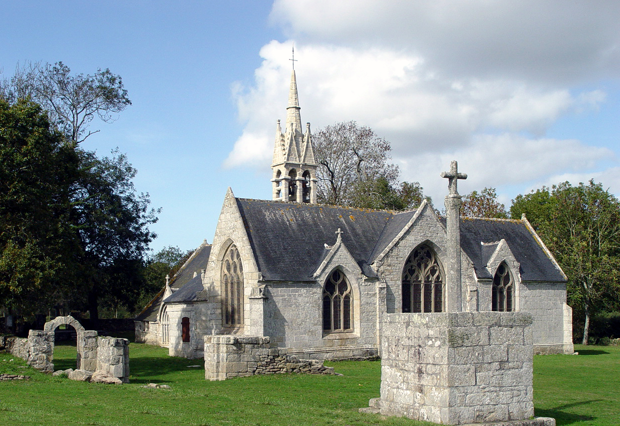 Plomeur (Bretagne, Finistère) Chapelle de la Tréminou et restes du calvaire situé à l'Est de la chapelle. .